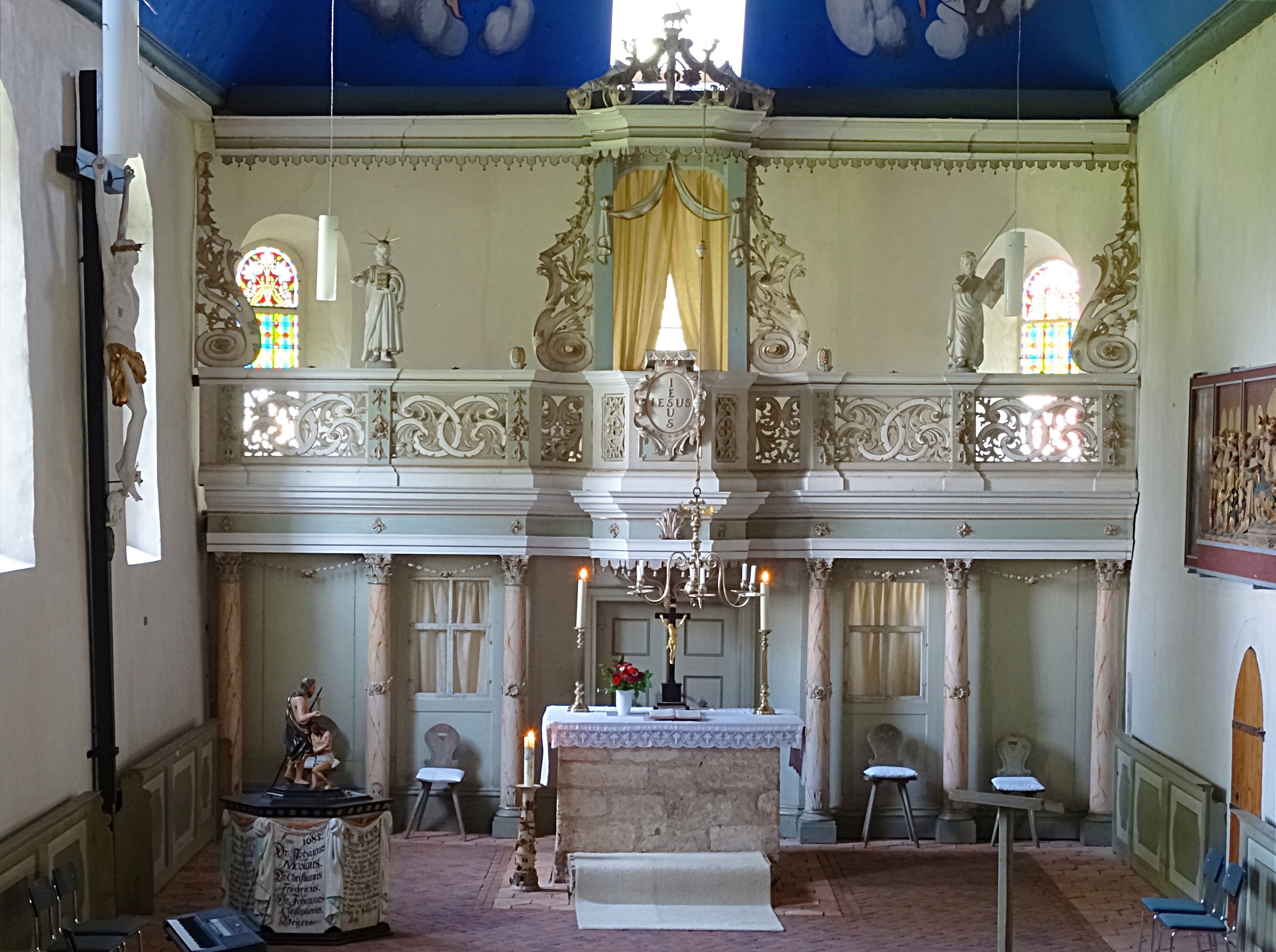 Chor der Dorfkirche St. Laurentius Kirchheim. Auf der Balustrade Jesus, der auf das Kreuz zeigt, und Moses mit den Gesetzestafeln.